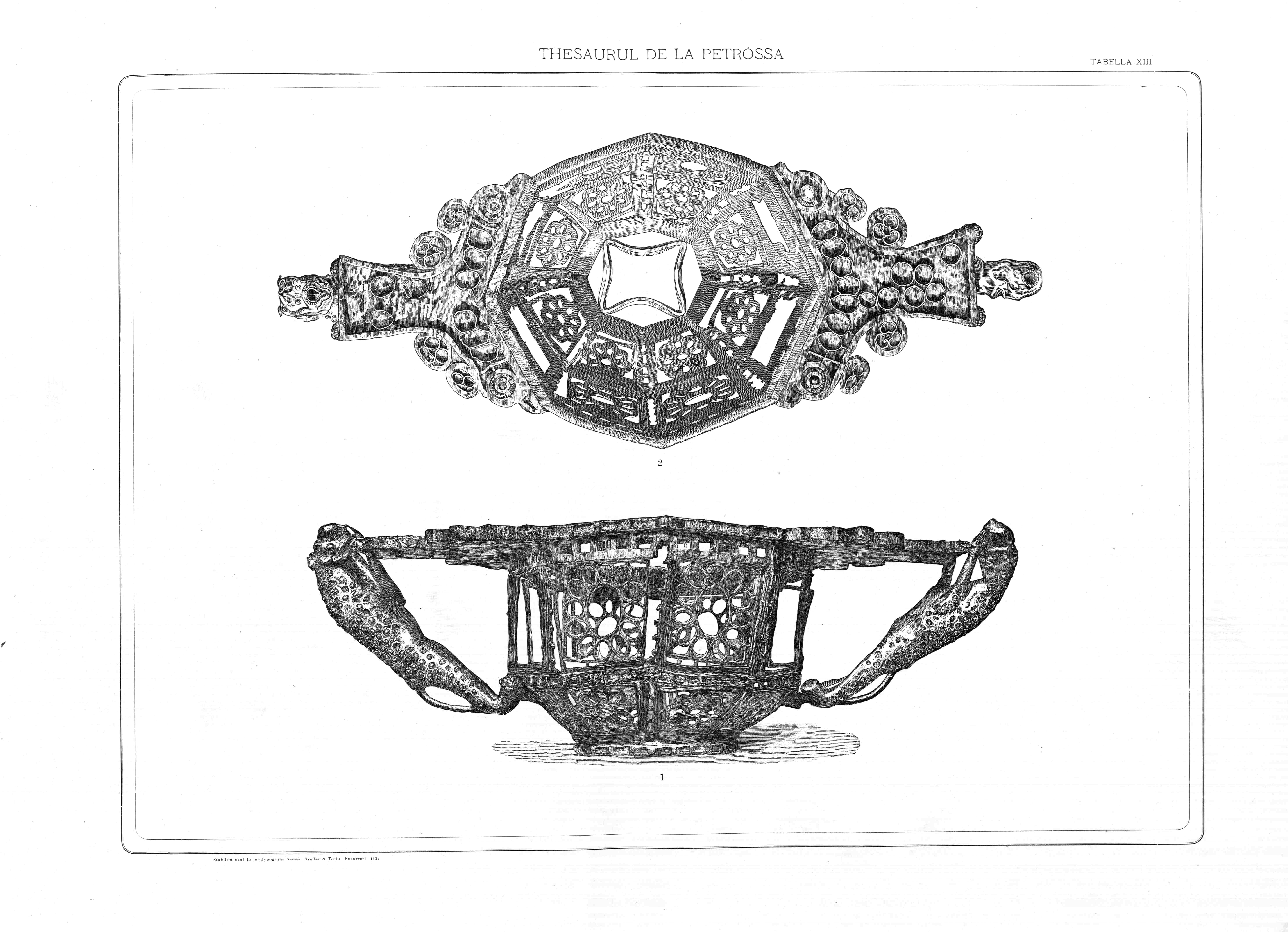 Panerașul sau căldărușa în opt colțuri. Mânerele sunt formate din doi leoparzi.